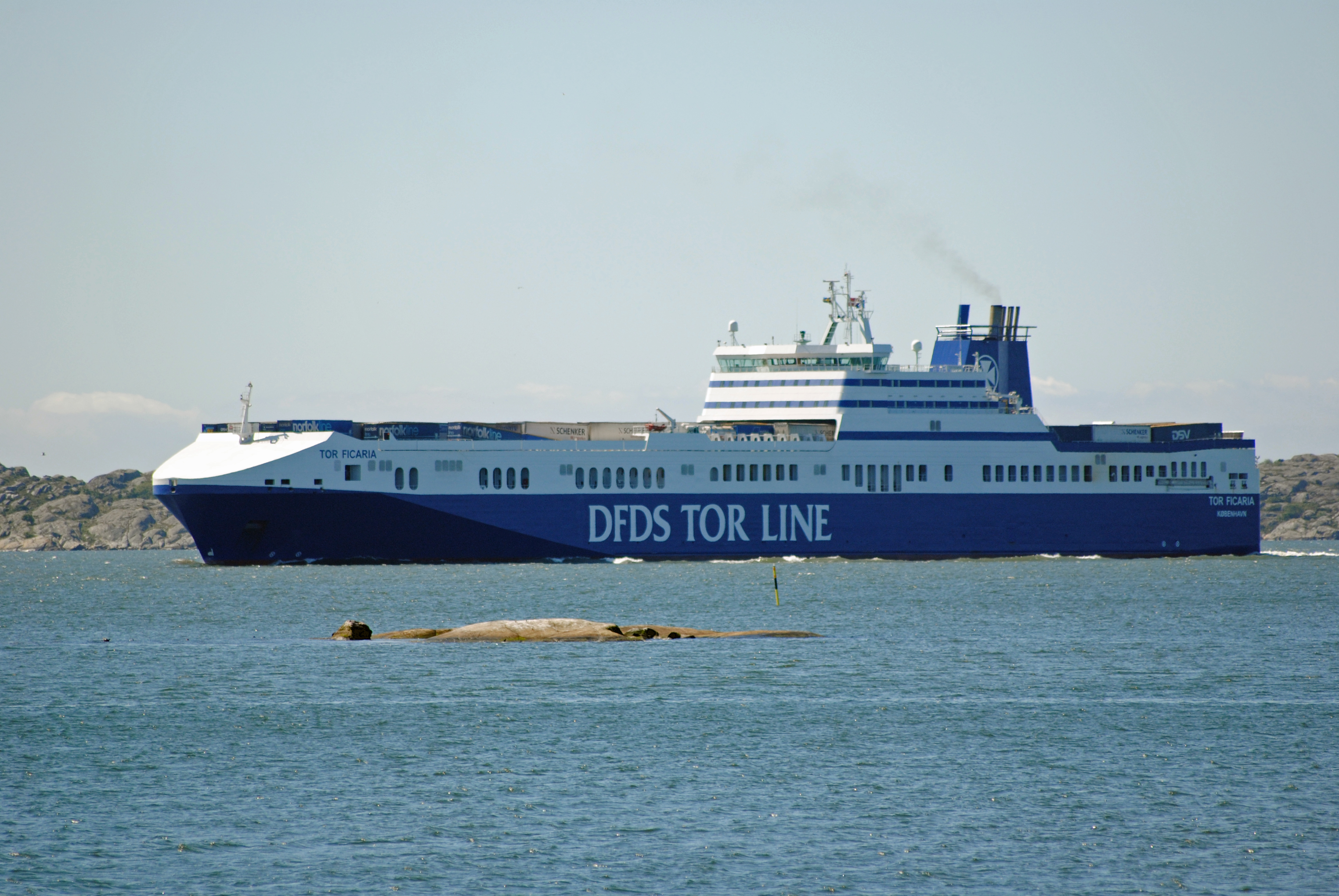 Tor Ficaria vid arendal i Göteborgs'hamn